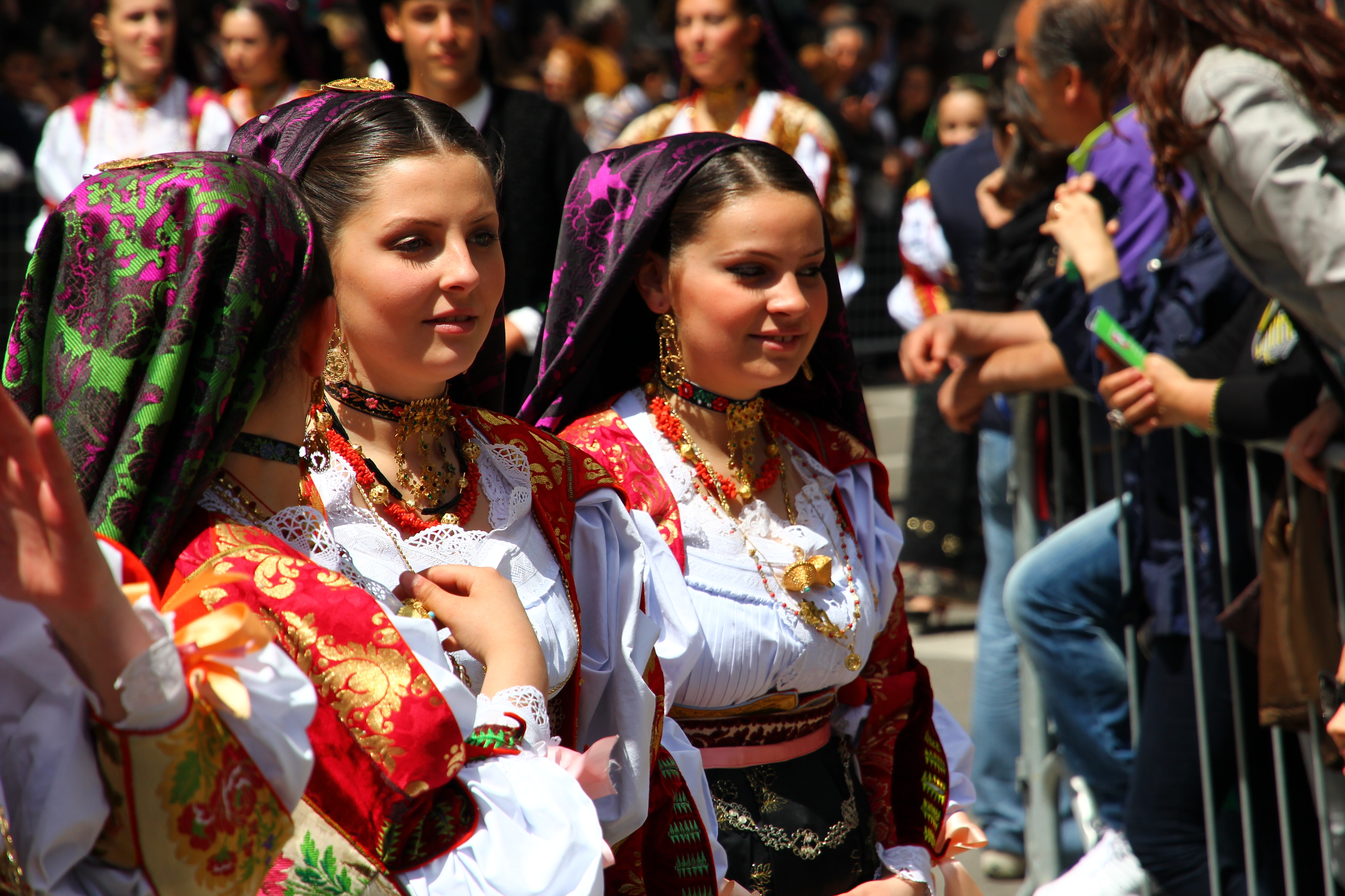 Cavalcata Sarda 2013 (Sassari)